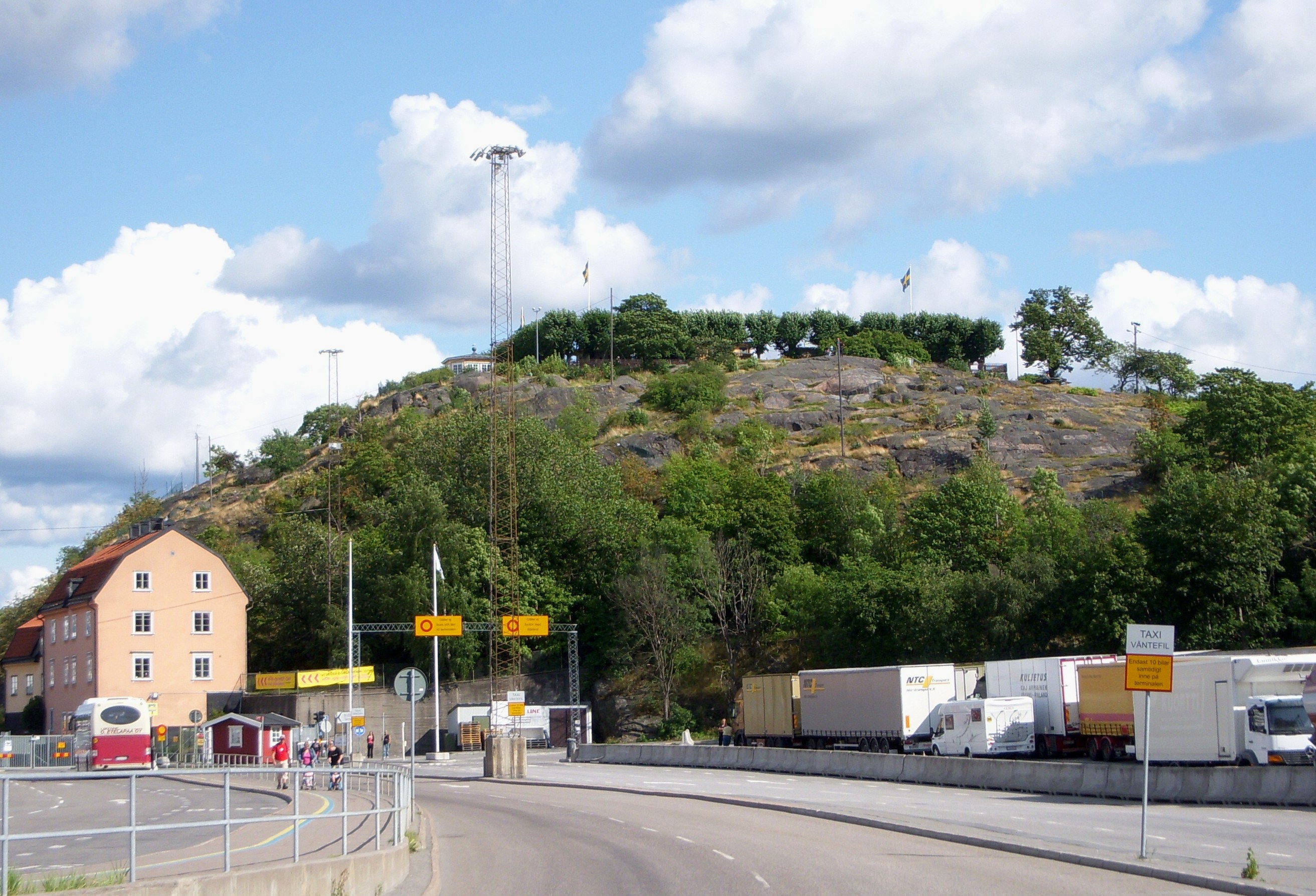 Fåfängan på Södermalm i Stockholm, översikt